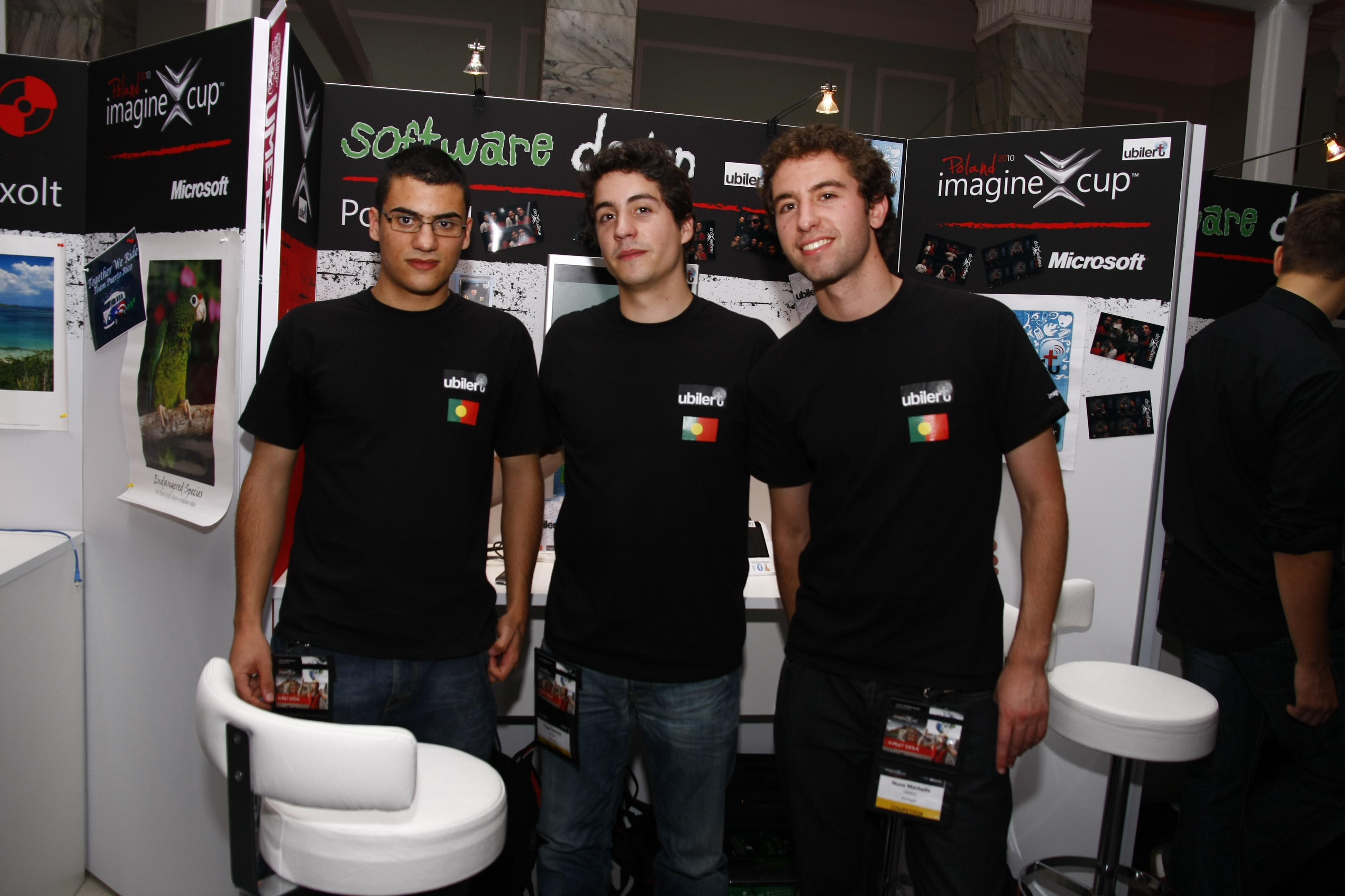 Três membros da equipa representante de Portugal na Imagine Cup de 2010, que desenvolveu o software Ubilert. Da esquerda para a direita: Xavier Vilaça, Tiago Ferreira e Nuno Machado, alunos do Instituto Superior Técnico. On July 5th the Imagine Cup teams shared their projects in the Palace of Culture and Science.